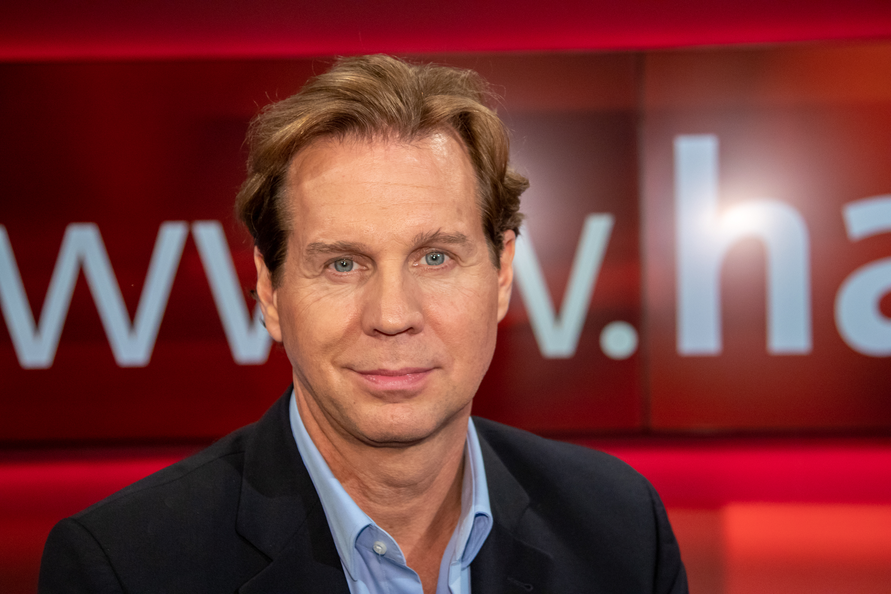 Thomas Heinze in der WDR-Sendung "hart aber fair" am 10.09.2018